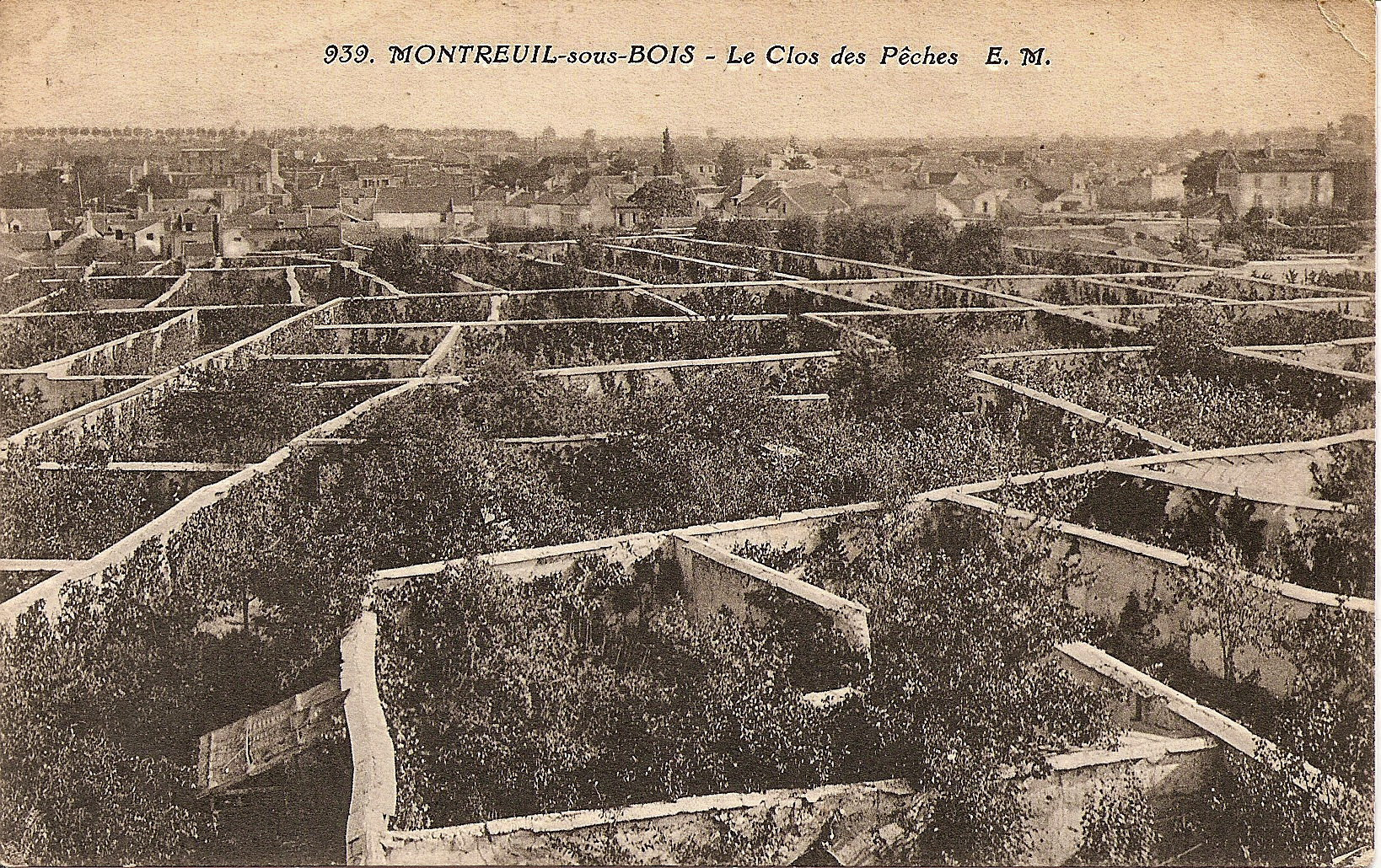 carte postale ancienne éditée par EM, N° 939MONTREUIL SOUS BOIS : Le Clos des Pêches.